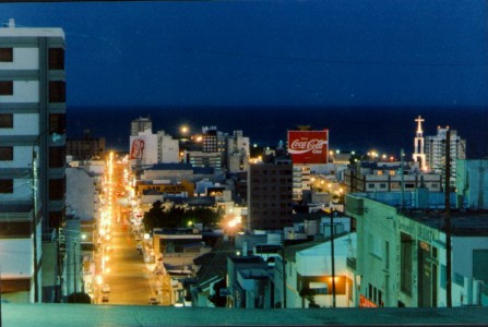 'n Nagtelike uitsig oor die hoofstraat van Comodoro Rivadavia.